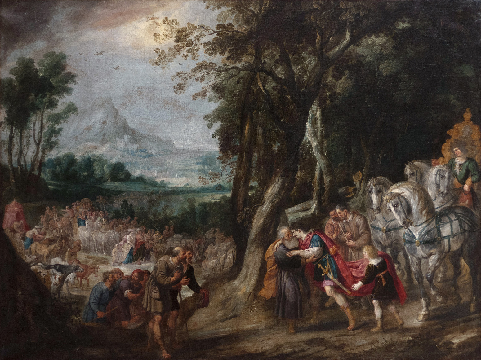 La rencontre de Jacob et de Joseph